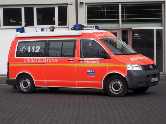 Einsatzfahrzeug des B- Dienstes